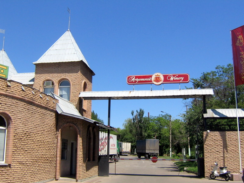 Прохідна Артемівського заводу шампанських вин